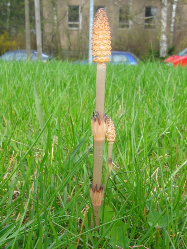 Acker-Schachtelhalm Equisetum arvense, Rostock